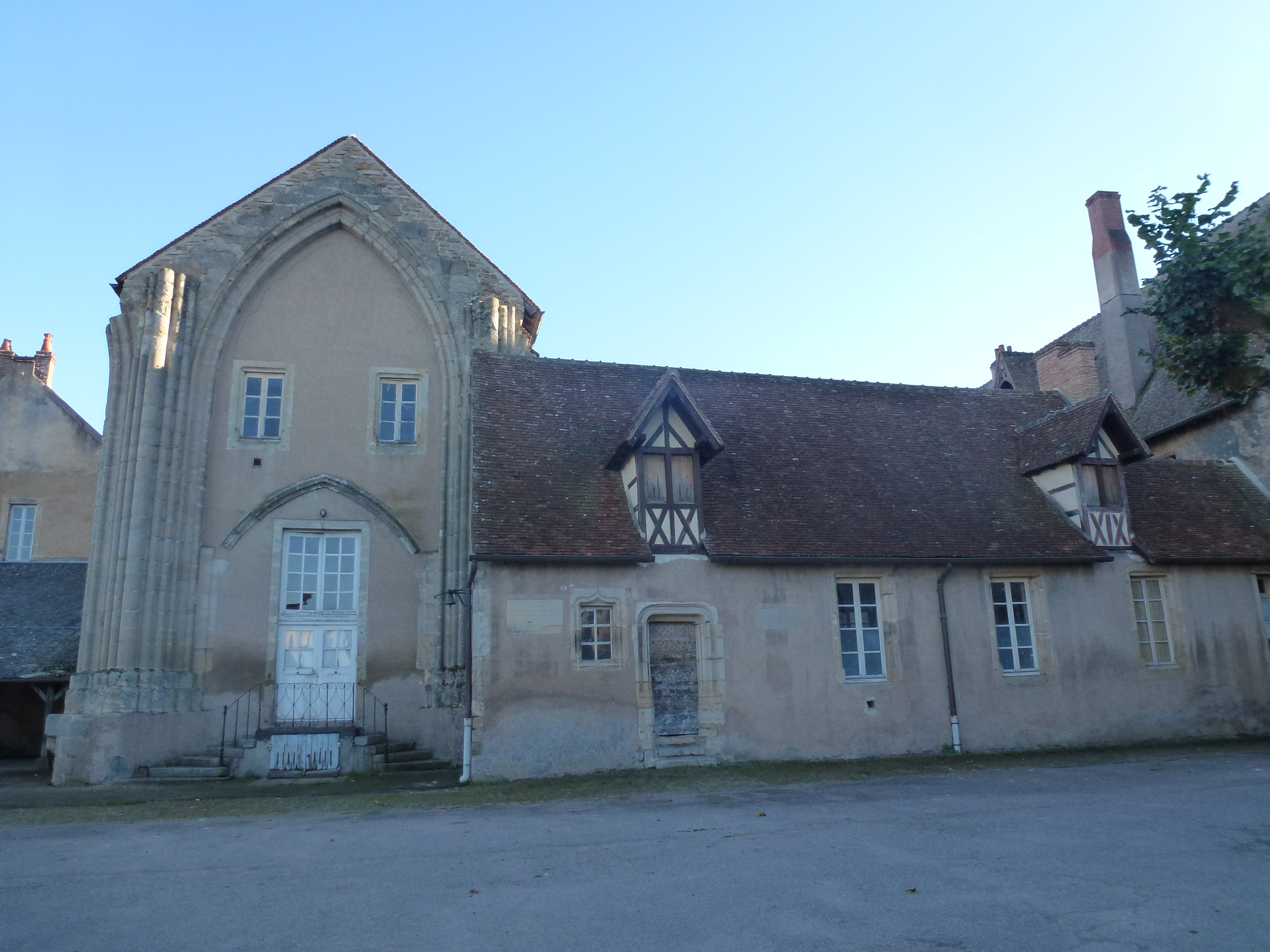 Groupe cathédral et canonial, place du Terreau Autun